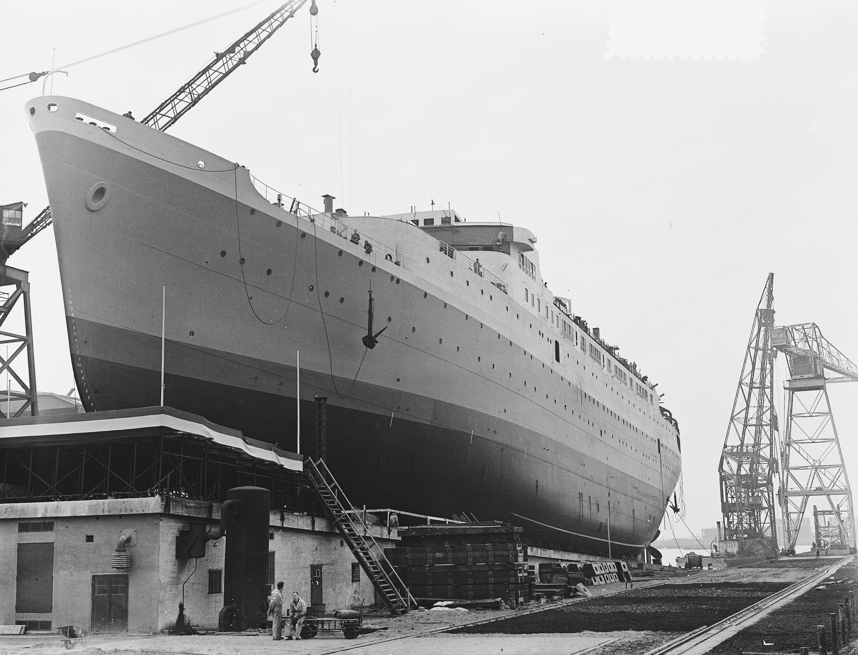 Collectie / Archief : Fotocollectie Anefo Reportage / Serie : [ onbekend ] Beschrijving : De "Maasdam" op helling scheepswerf Wilton Feijenoord Datum : 4 april 1952 Locatie : Rotterdam, Zuid-Holland Trefwoorden : passagiersschepen, scheepsbouw Instellingsnaam : Feyenoord Fotograaf : Pot, Harry / Anefo Auteursrechthebbende : Nationaal Archief Materiaalsoort : Glasnegatief Nummer archiefinventaris : bekijk toegang 2.24.01.09 Bestanddeelnummer : 905-0365